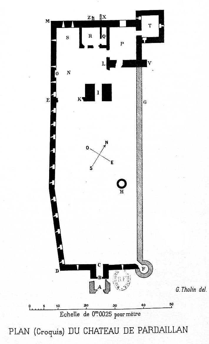 Plan du château de Pardaillan (Gers) par G. Tholin, état avant 1898. Illustration de l’ouvrage de Ph. Lauzun « Les châteaux gascons de la fin du XIIIe siècle », Auch, G. Foix 1898.